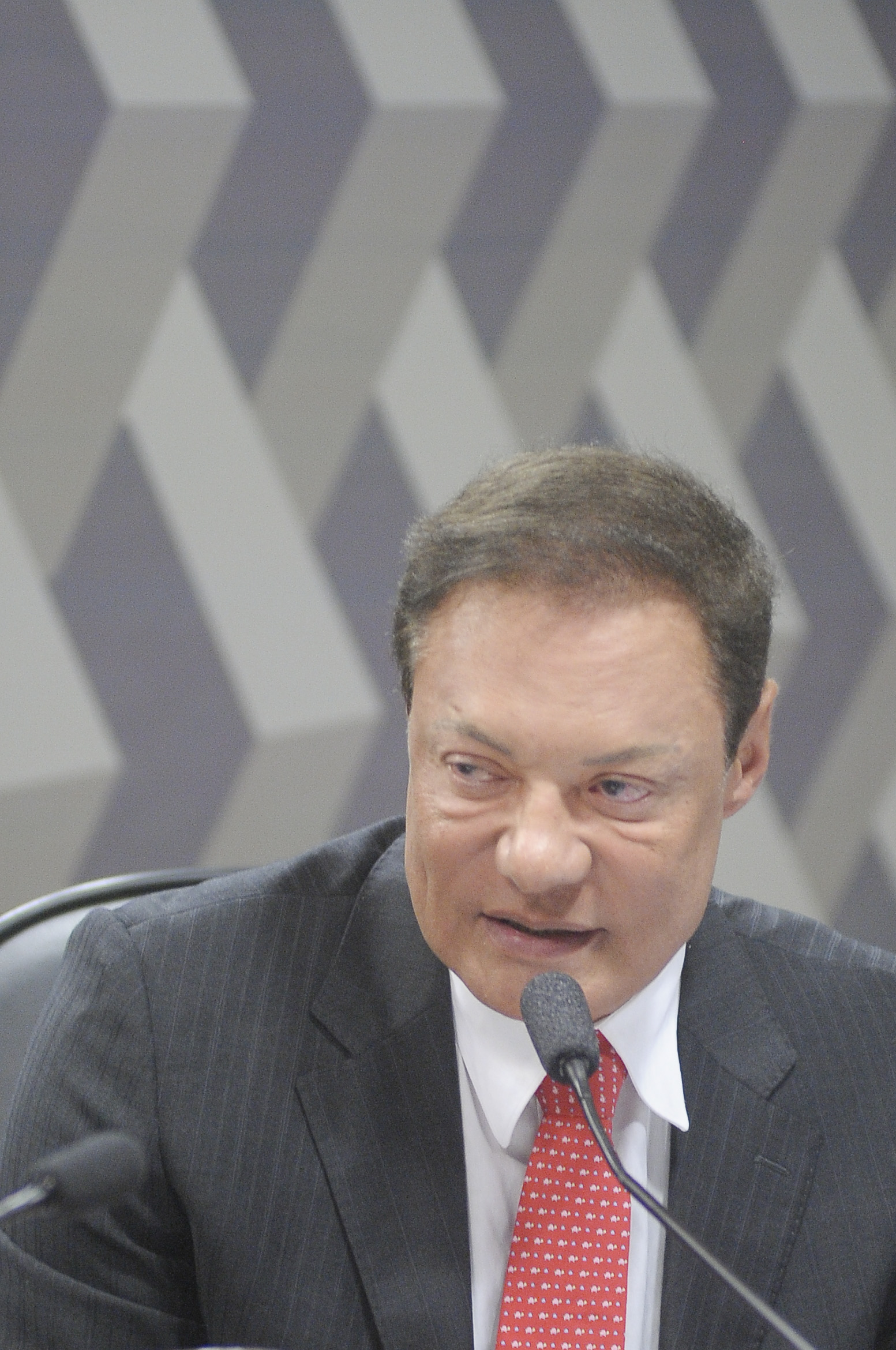 Comissão de Serviços de Infraestrutura (CI) realiza leitura de relatório e sabatina de indicados para o Departamento Nacional de Infraestrutura de Transportes (Dnit) e Agência Nacional de Transportes Terrestres (ANTT). Em pronunciamento, o indicado para exercer o cargo de diretor da Agência Nacional de Transportes Terrestres (ANTT), Mário Rodrigues Júnior. Foto: Pedro França/Agência Senado